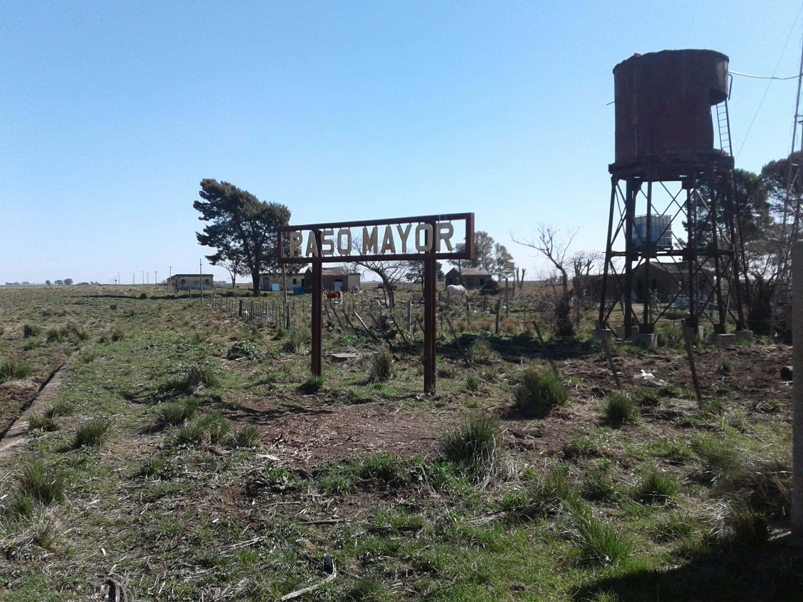 Vista del anden principal el tanque de agua para locomotoras a vapor y cartel nomenclador.